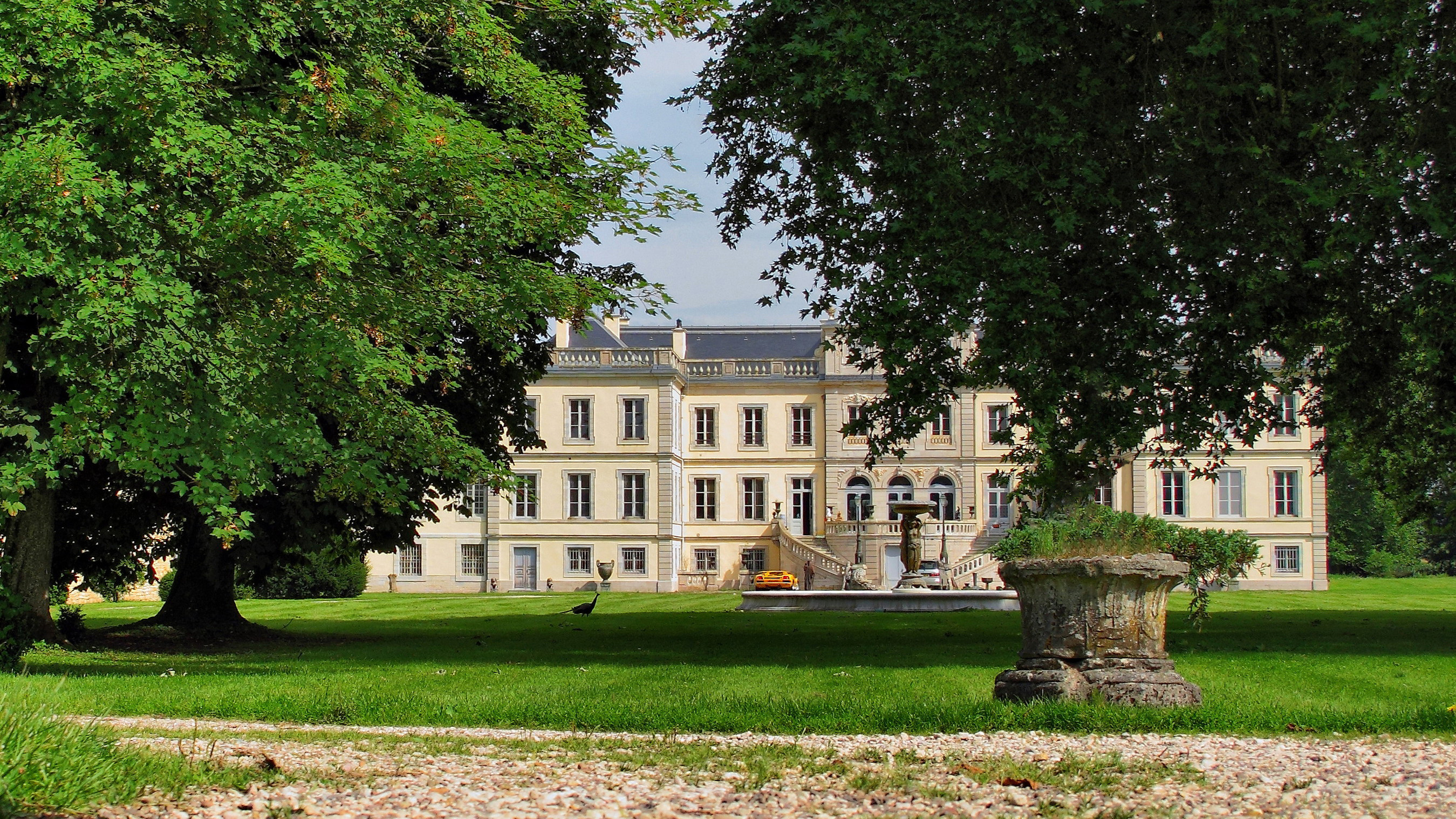 Inscrit aux monuments historiques sous le numéro PA00135346